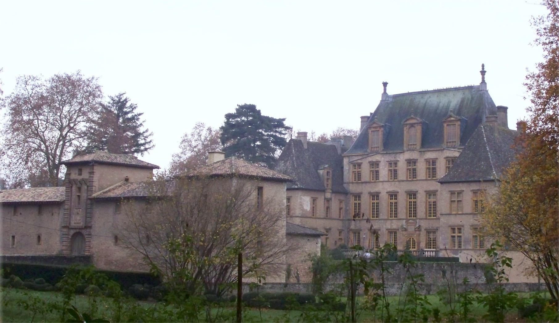 Château de Fléchères, commune de Fareins dans l'Ain.